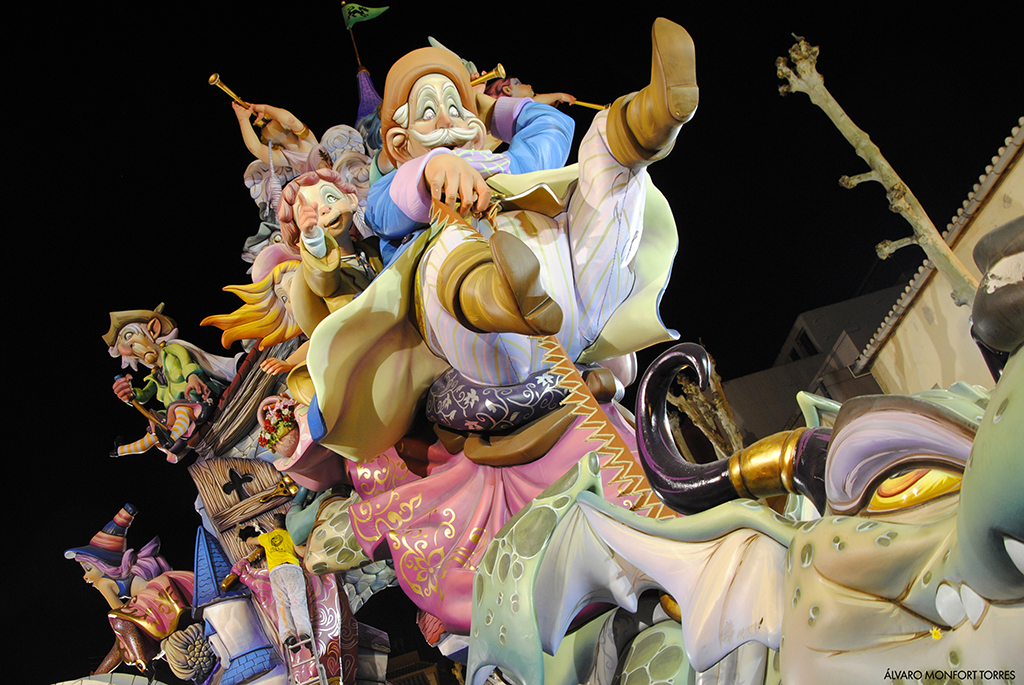 Cadafal de la Falla Oeste de 2017, obra de Palacio i Serra. Fotografia de Alvaro Monfort Torres. This is a photography of a Folklore festival in Spain (Wikidata id Q47120057).